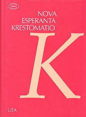 librokovrilo de "Nova Esperanta Krestomatio", 1991